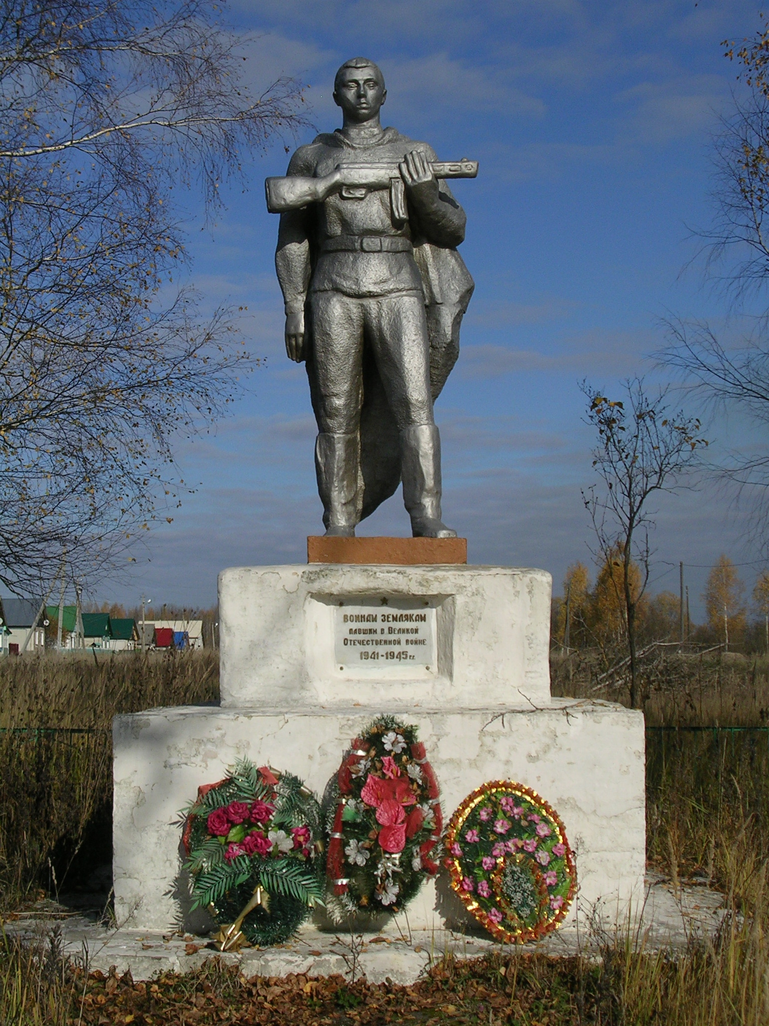 Тихоновский мемориал павшим войнам землякам в Великой Отечественной Войне.